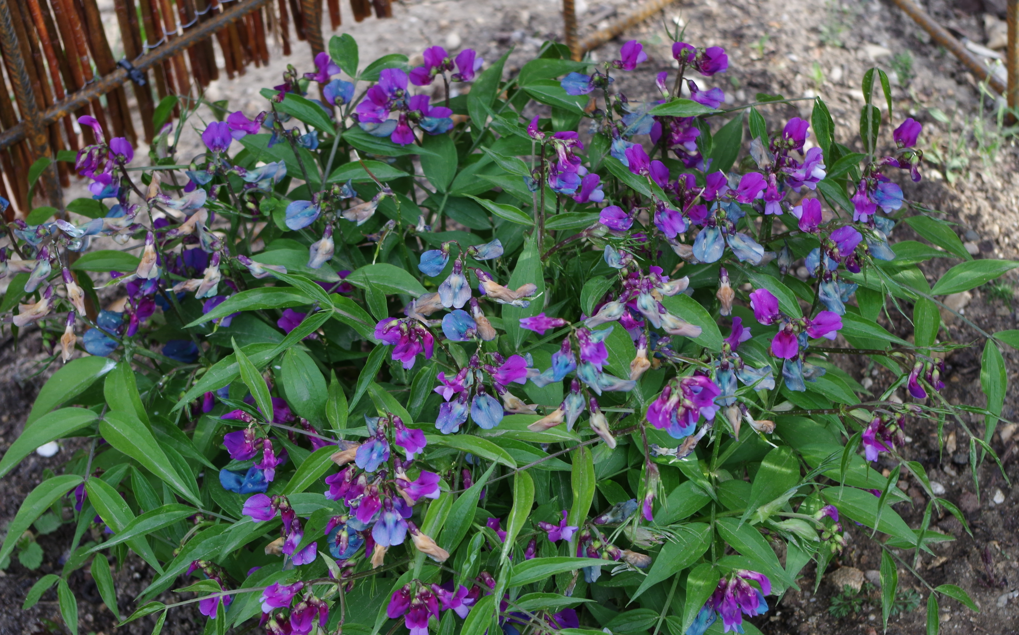 Lathyrus vernus - Jardin des Plantes